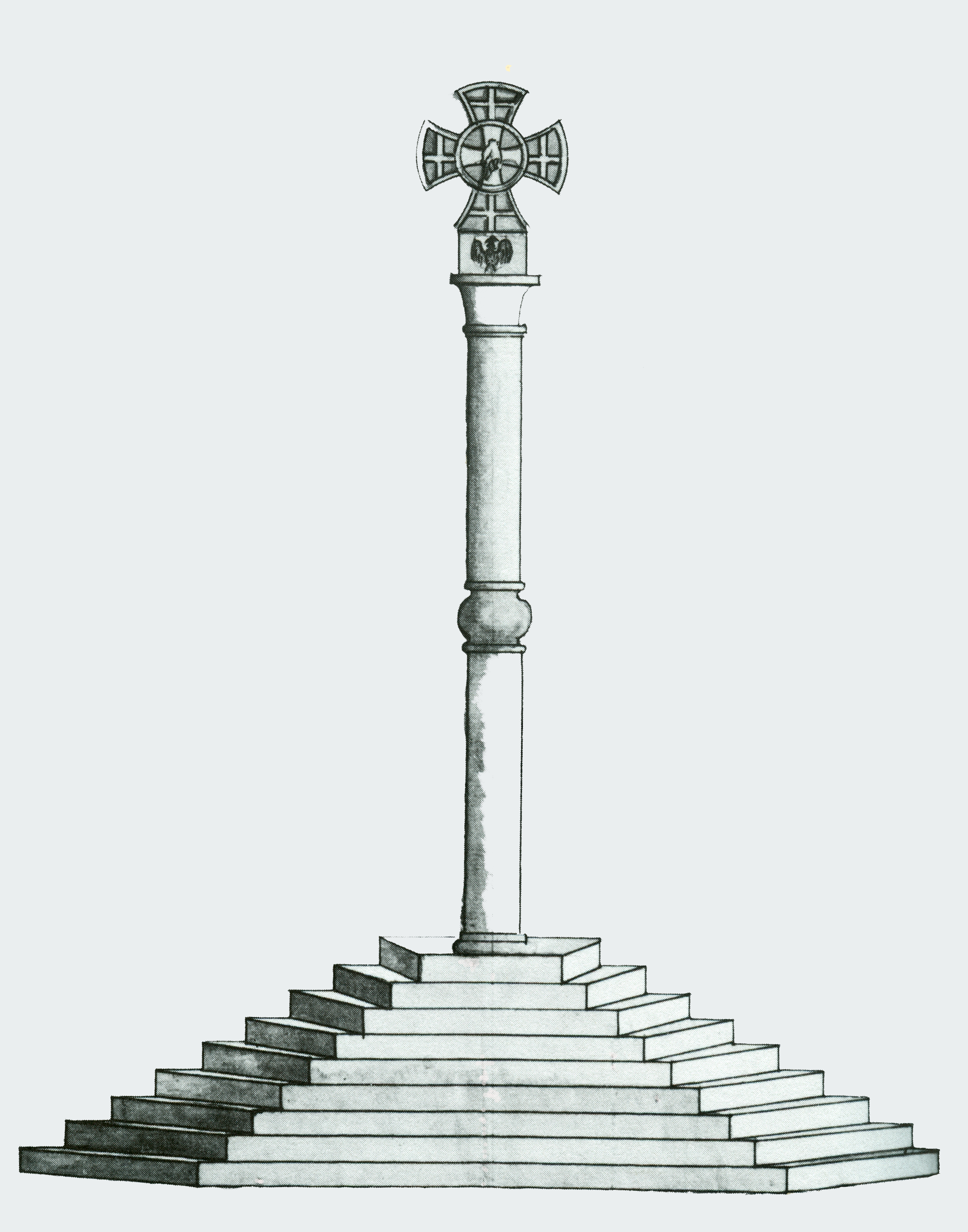 D'Iechternacher Justizkräiz am Joer 1774 (Zeechnung vum deemolege Schäffe vun der Abtei Théodore Lorent). Source: Spang, P., 1982. La croix de justice d'Echternach: (quelques documents inédits à verser au dossier d'une affaire locale). In: Hémecht, Jg. 34(1982), H. 1, S. 56 (modifizéiert). Opgepasst: de Mann heescht Théodore Lorent an net Théodore Laurent, wéi dat an der Bemierkung steet!